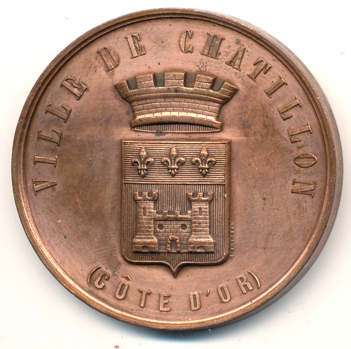 Médaille pour la ville de Chatillon (Côte d'or), bronze, 44mm, signée Desaide